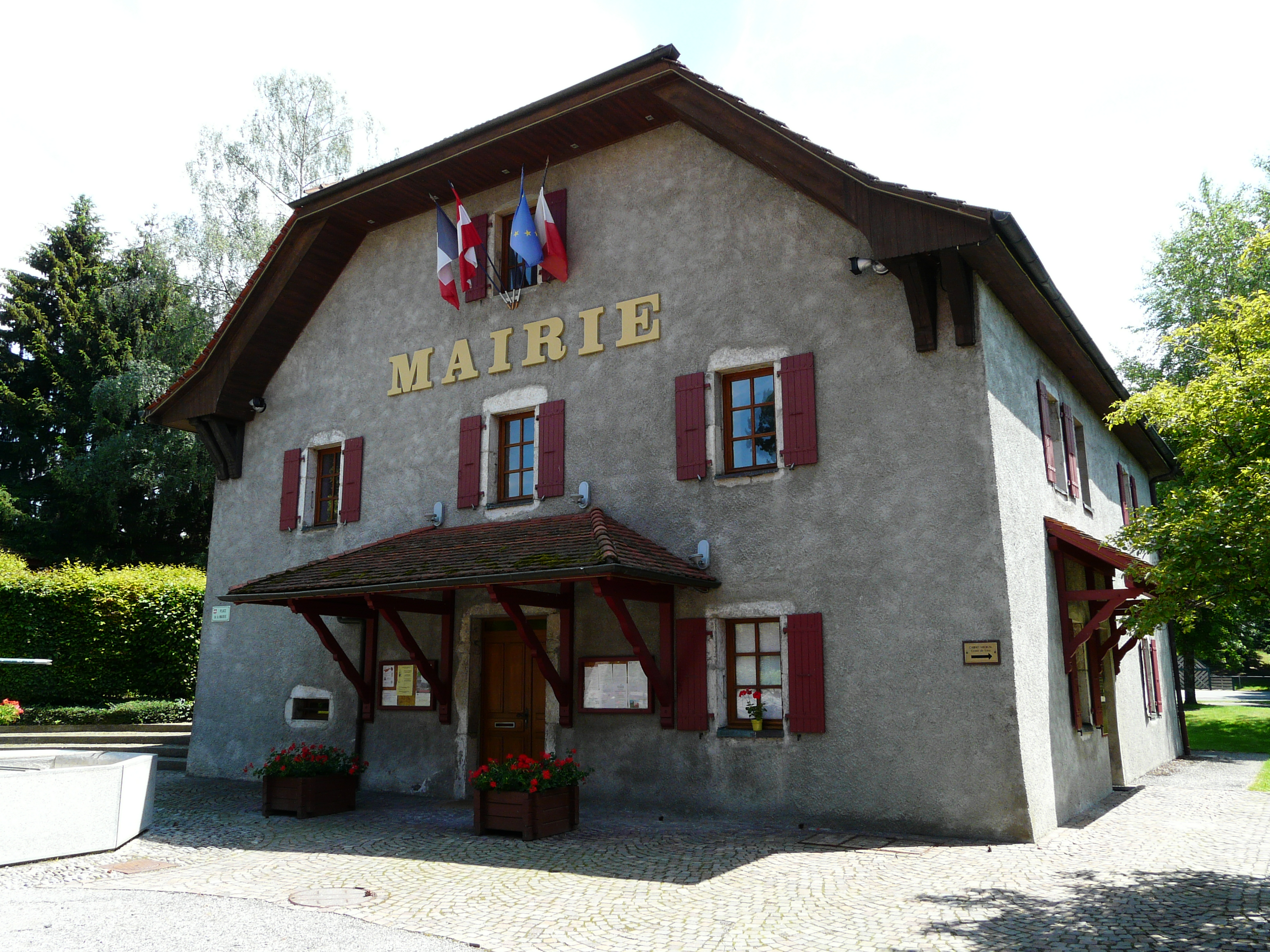 Mairie de Champanges (Haute-Savoie)